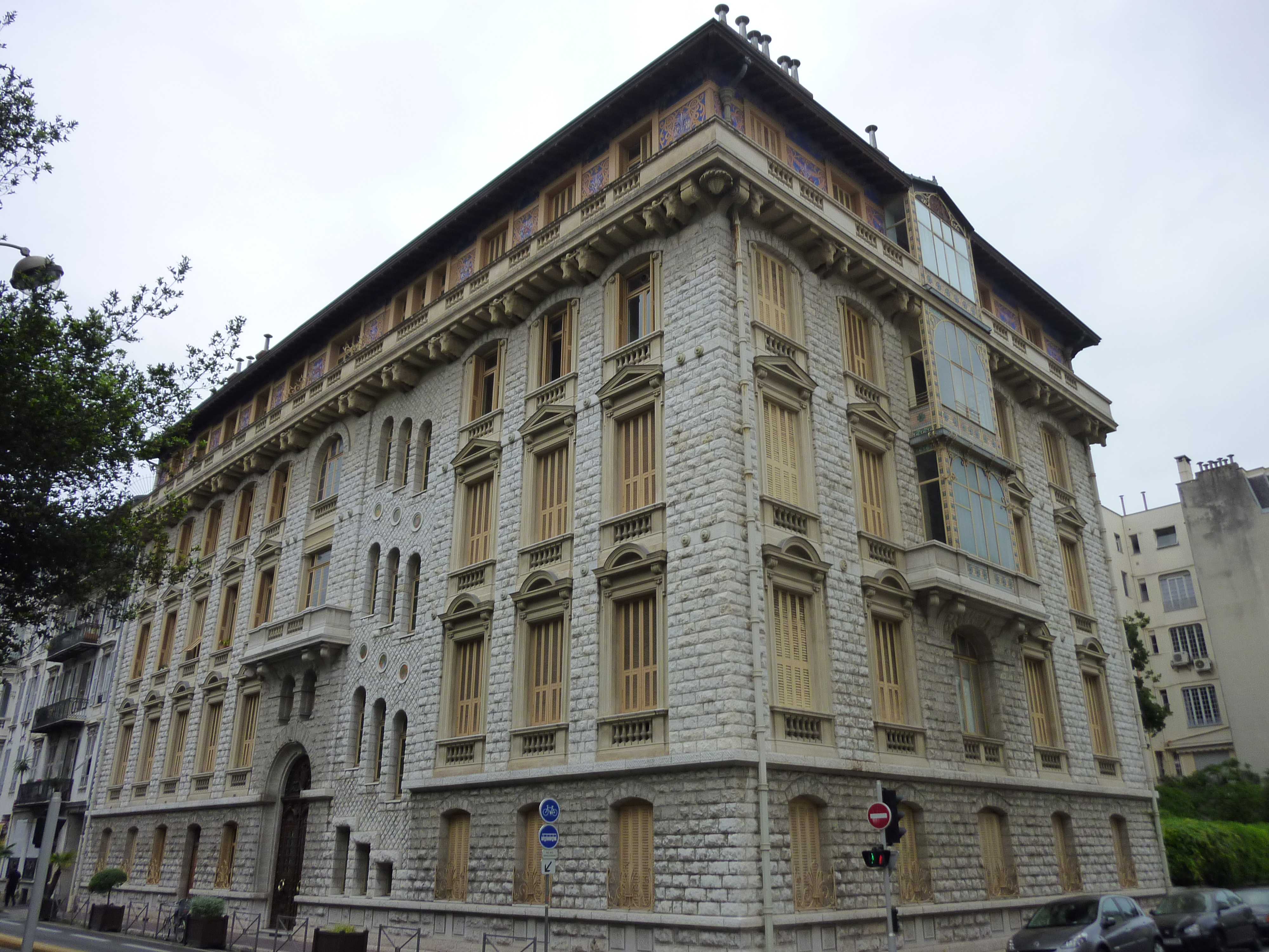 Palais Baréty (Nice, Alpes-Maritimes, France) .